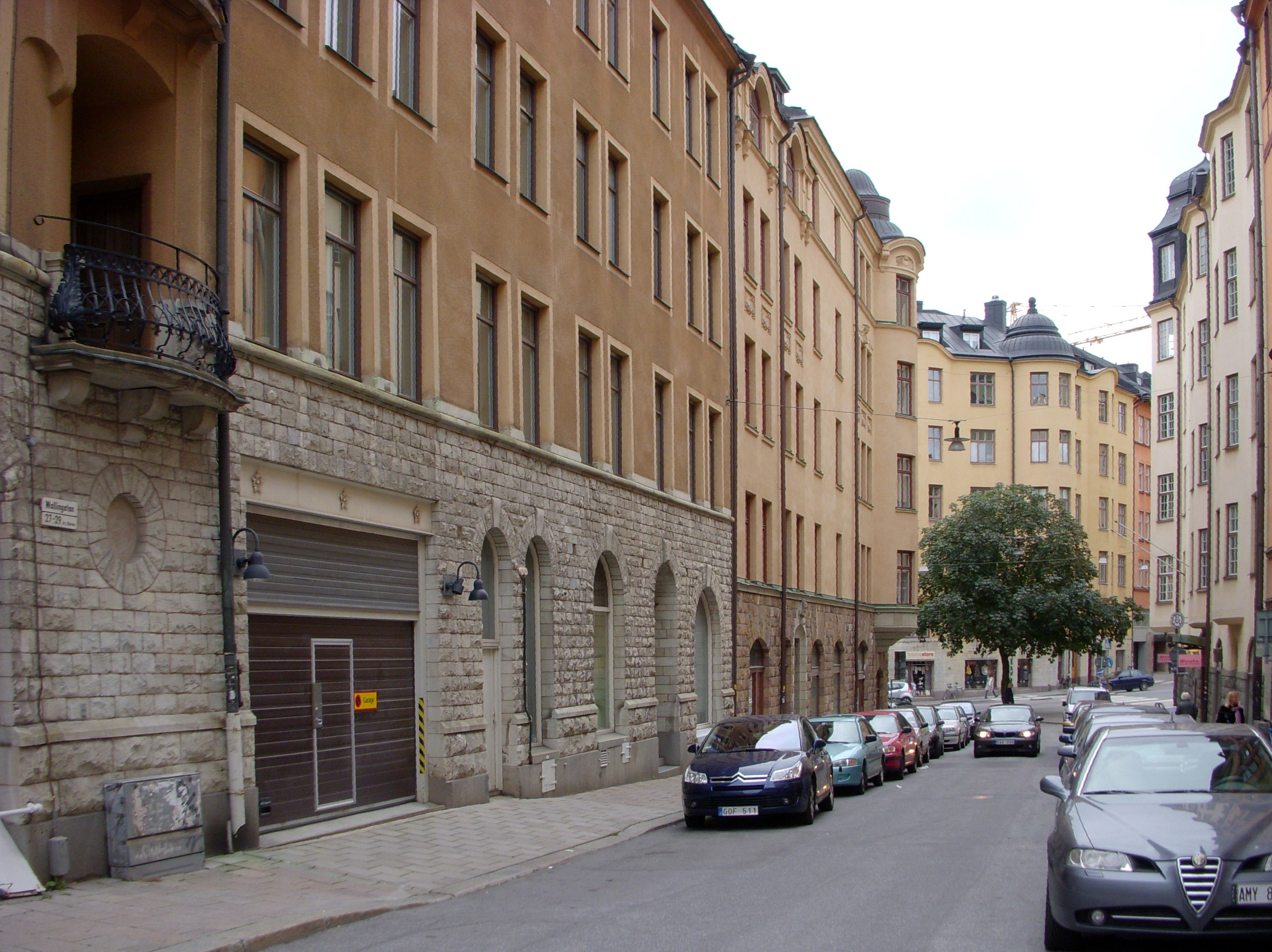 Wallingatan i Stockholm, vy mot väst